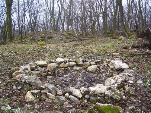 Місце, на якому стояв ідол Святовита (Збручанський ідол)